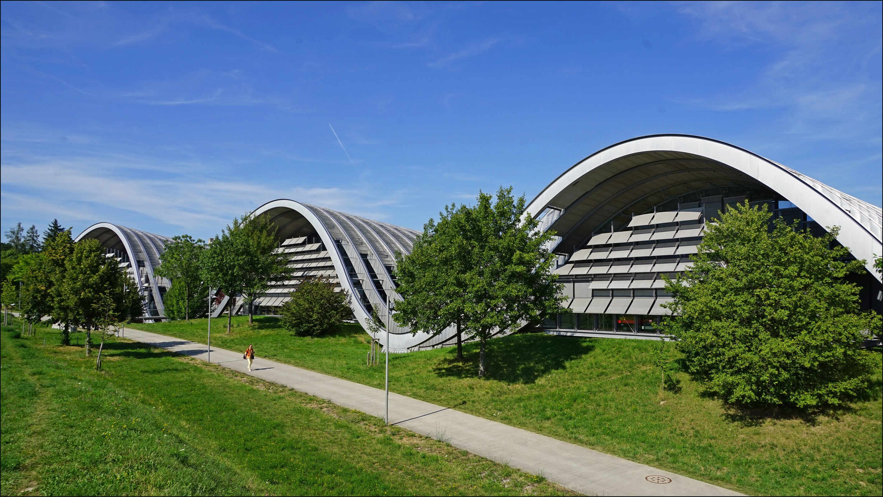 La façade du Zentrum Paul Klee à Berne (Suisse) La forme du bâtiment était préexistante dans le paysage. Nous avons donc commencé à "labourer la terre" comme des paysans plutôt que des architectes - jusqu'à ce que le paysage se transforme en bâtiment. (Renzo Piano) Le Zentrum Paul Klee a été conçu par l'agence de l'architecte Renzo Piano (RPBW : Renzo Piano Building Workshop) associée à divers collaborateurs et architectes suisses, pour le compte d'un important mécène : la fondation Maurice E. et Martha Müller (Maurice E. Müller a été le chirurgien qui a inventé la prothèse de hanche). Le centre Paul Klee a été ouvert en 2005, il dépend de la ville de Berne. Site officiel du Zentrum Paul Klee à Berne en Suisse